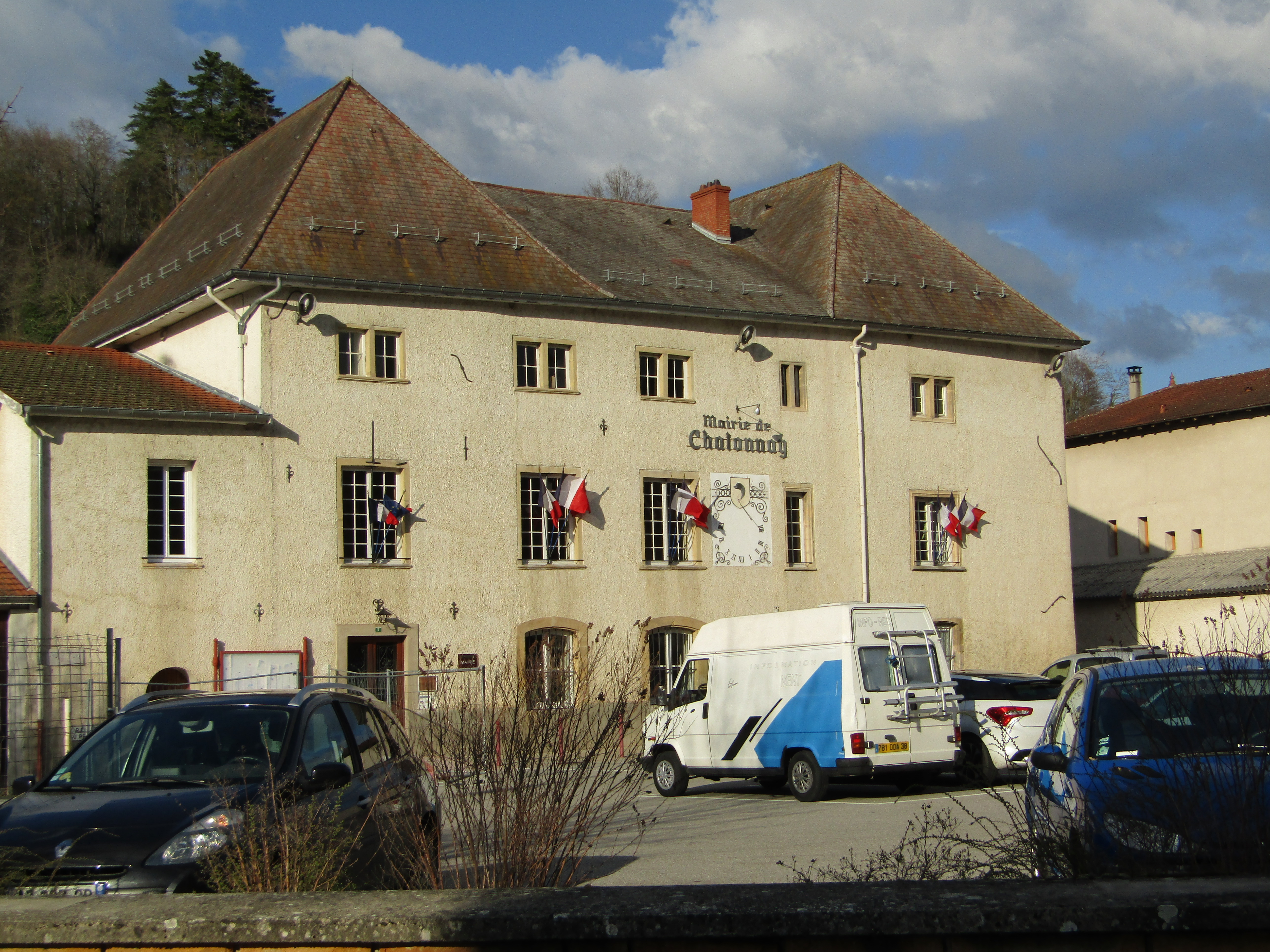 Châtonnay (mairie) en mars 2019